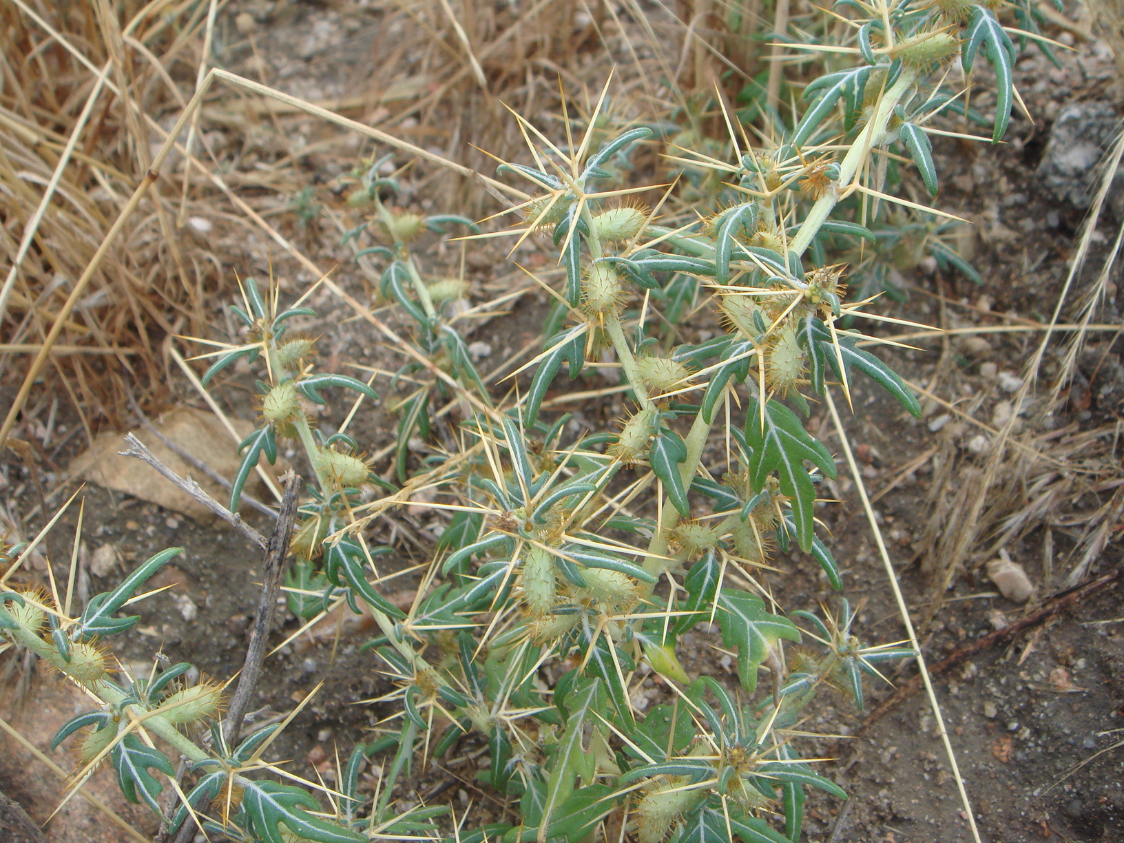 Xanthium spinosum, La Torre (Ávila), España